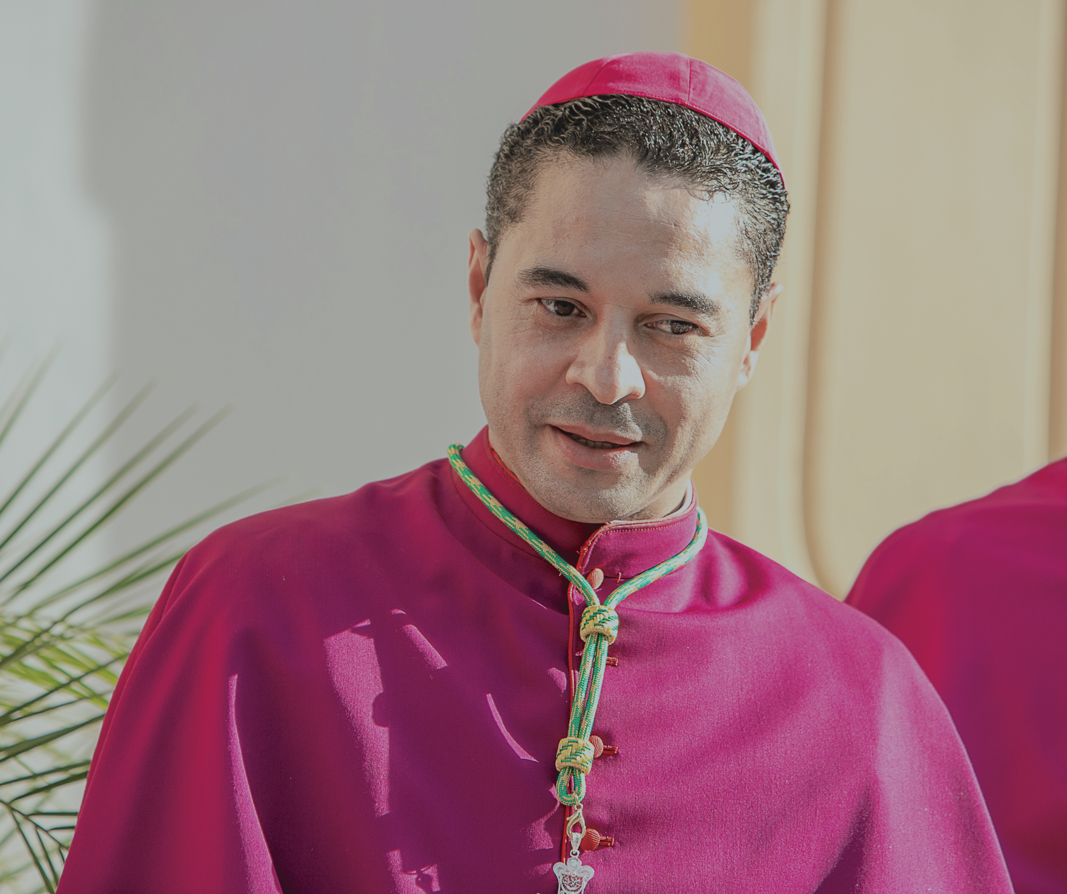 Foto de Dom Lindomar Rocha